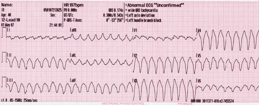 Rhythm Generated